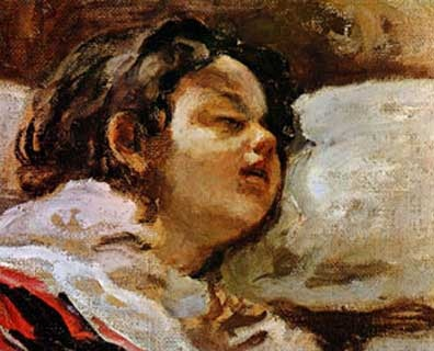 Pintura de Gonzales